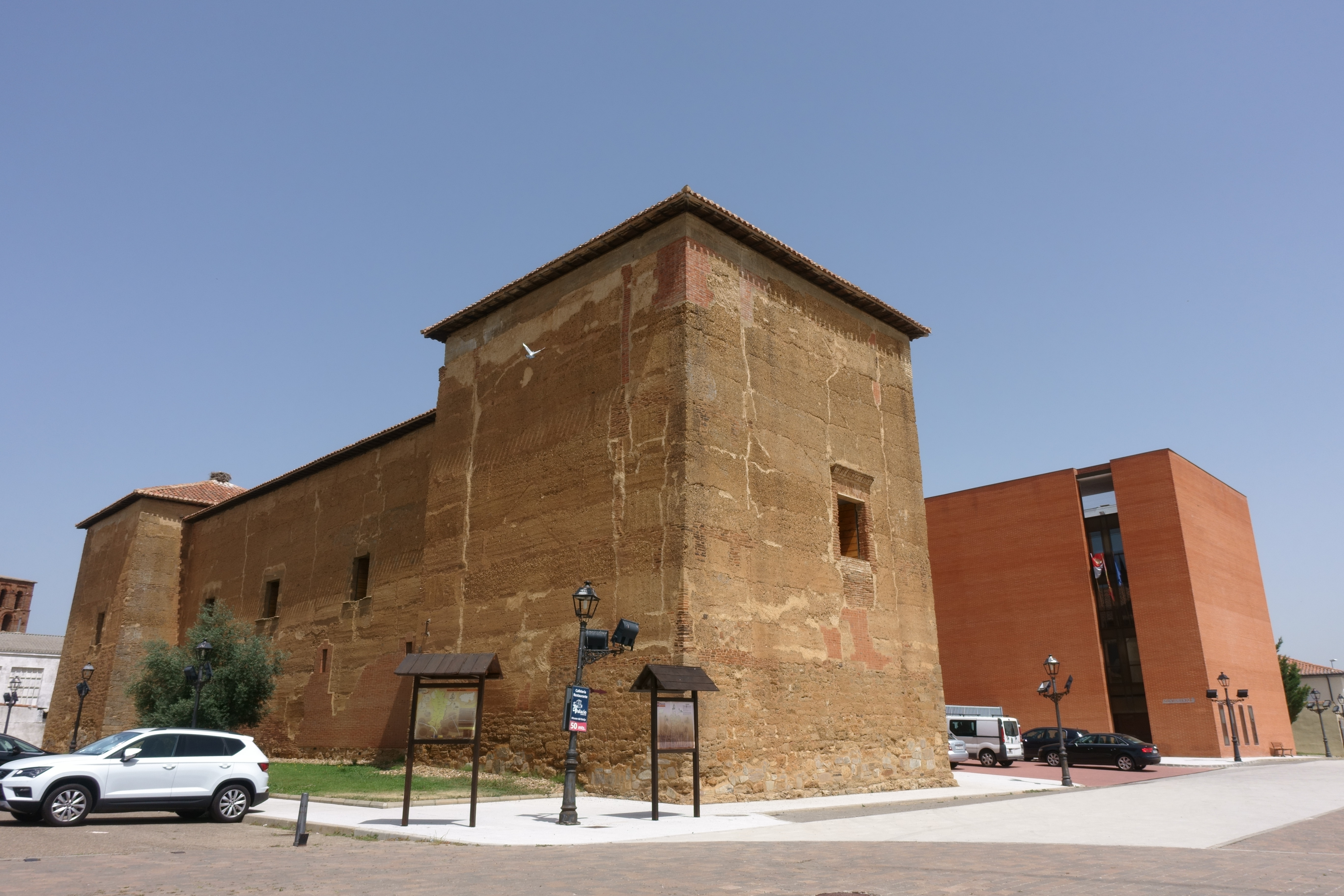 Palacio de los Guzmanes, en Toral de los Guzmanes (León, España).